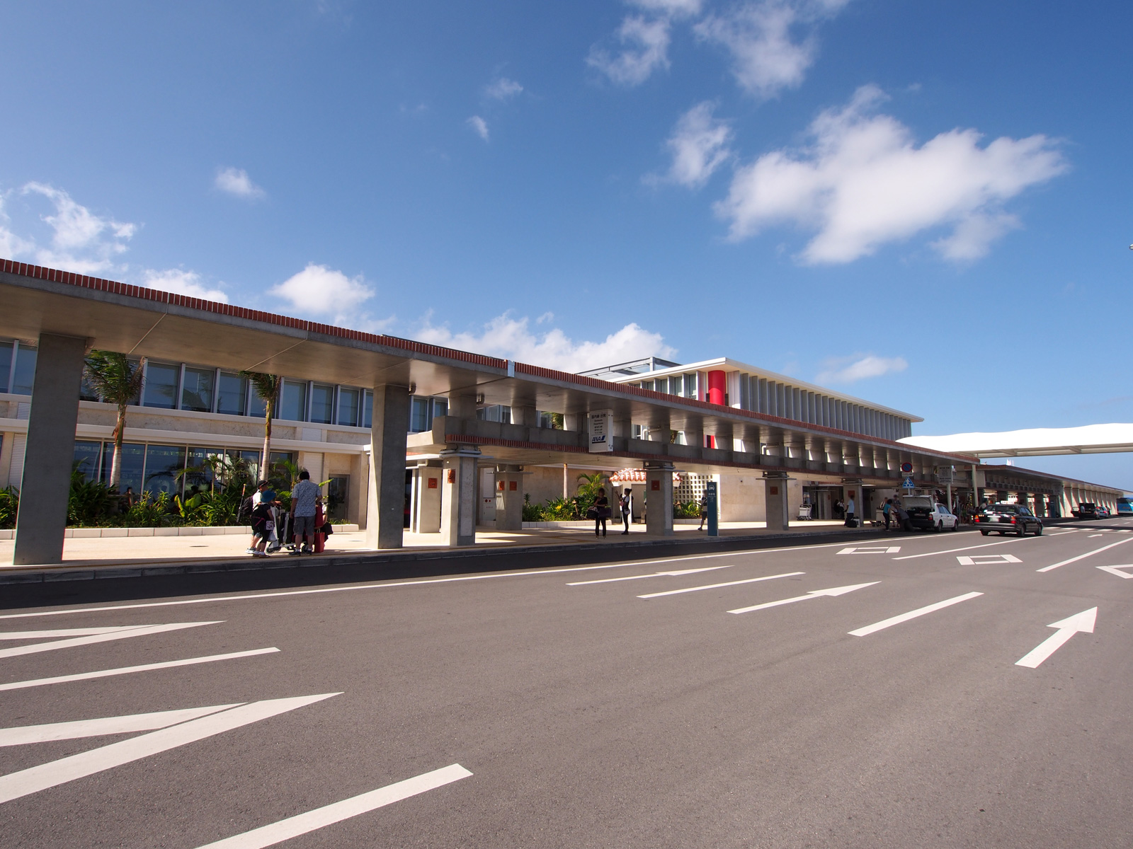 新石垣島空港